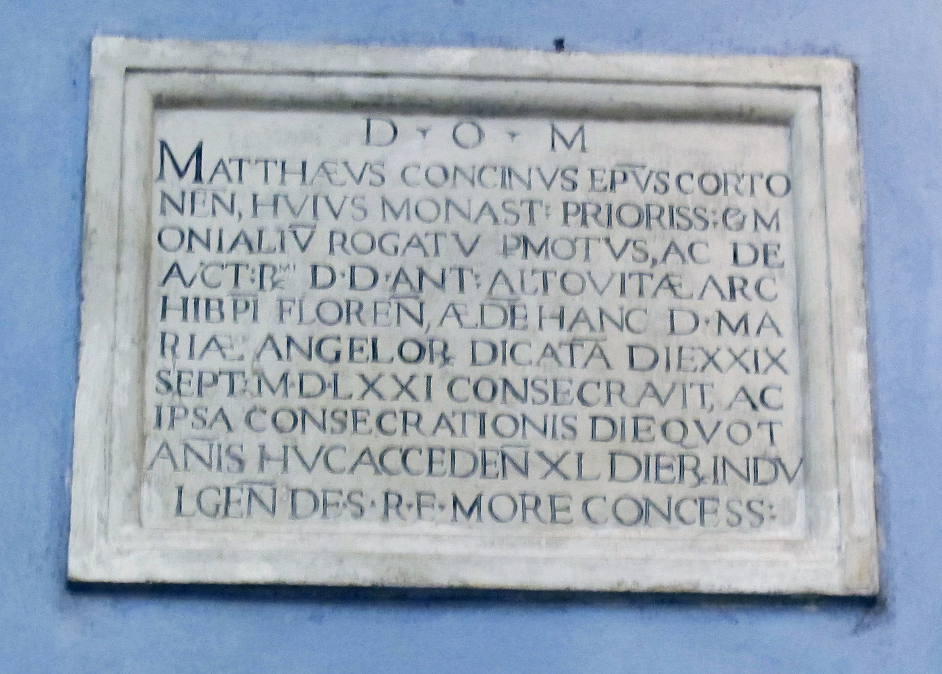 Santa maria degli angiolini, interno, targa consacrazione